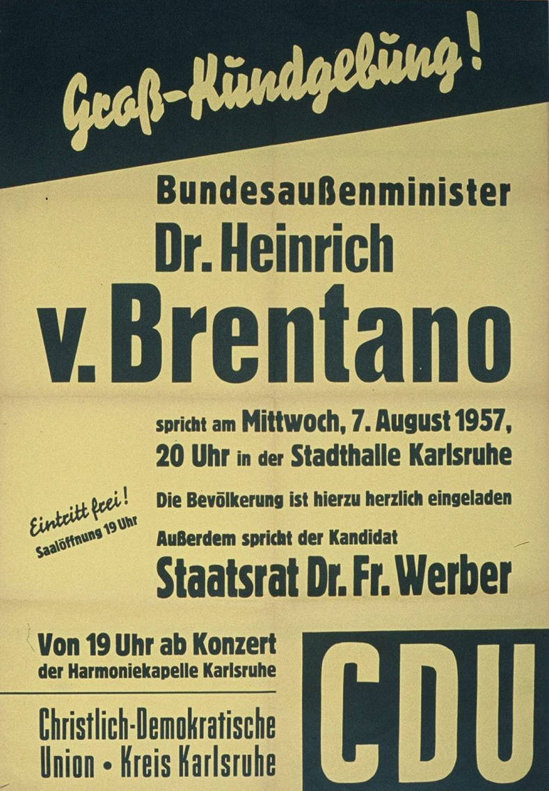 Groß-Kundgebung! Bundesaußenminister Dr. Heinrich v. Brentano spricht ... Außerdem spricht der Kandidat Staatsrat Dr. Fr. Werber Plakatart:AnkündigungsplakatAuftraggeber:CDU Kreis KarlsruheObjekt-Signatur:10-001: 622Bestand:Plakate zu Bundestagswahlen (10-001)GliederungBestand10-18:Plakate zu Bundestagswahlen (10-001) » Die 3. Bundestagswahl am 15. September 1957 » CDU » AnkündigungsplakateLizenz:KAS/ACDP 10-001: 622 CC-BY-SA 3.0 DE